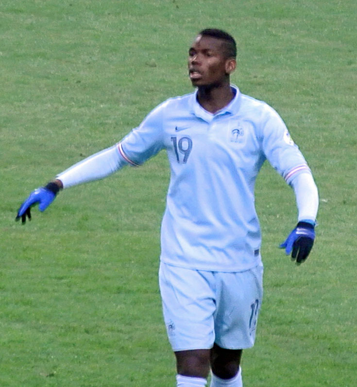 Paul Pogba avec la France face à la Georgie, le 22 mars 2013.